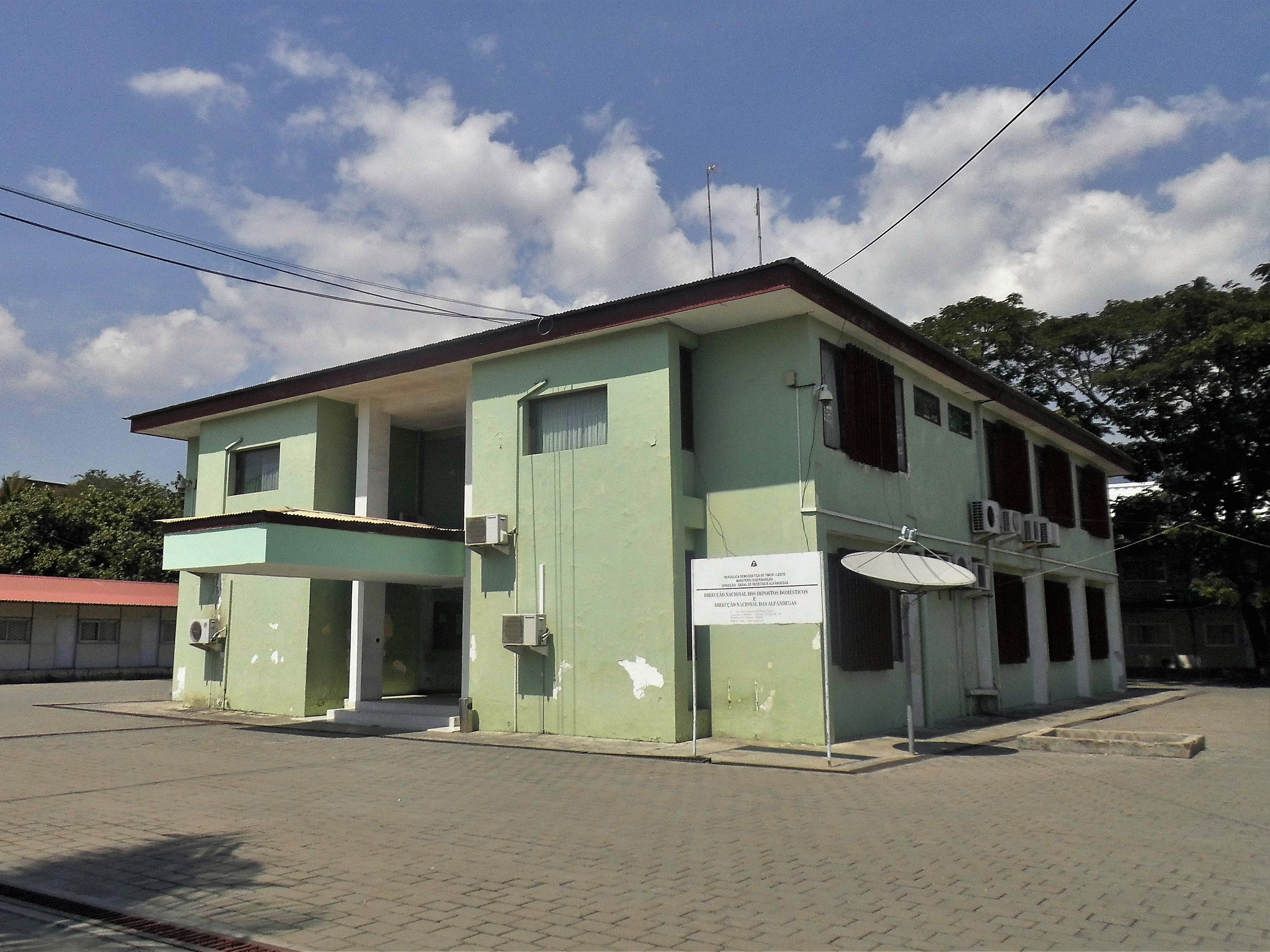 Direccao Nacional dos Impostos Domesticos e Direccao Nacional das Alfandegas